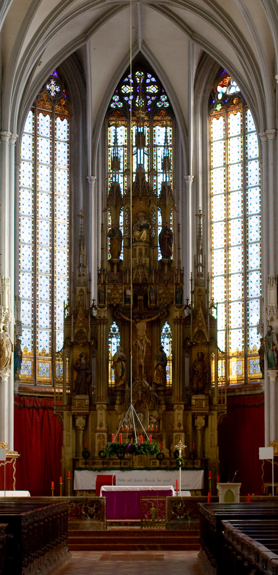 Der neugotische Hochaltar der Steyrer Stadtpfarrkirche